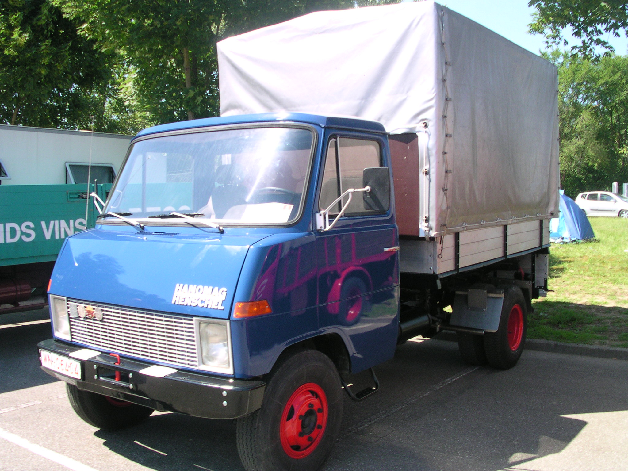 Wörth am Rhein, Oldtimer-Treffen bei Daimler-Chrysler Henschel-Henschel F 55 mit kurzer Pritsche